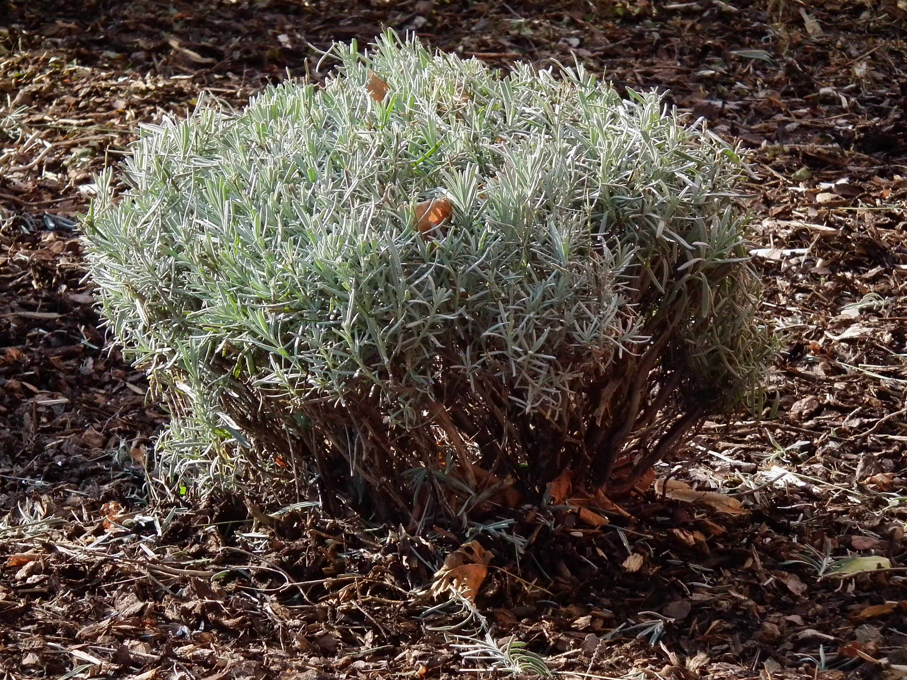 Zurückgeschnittener Lavendel (Lavandula), fotografiert in einem Garten in Bensheim (Hessen, Deutschland)